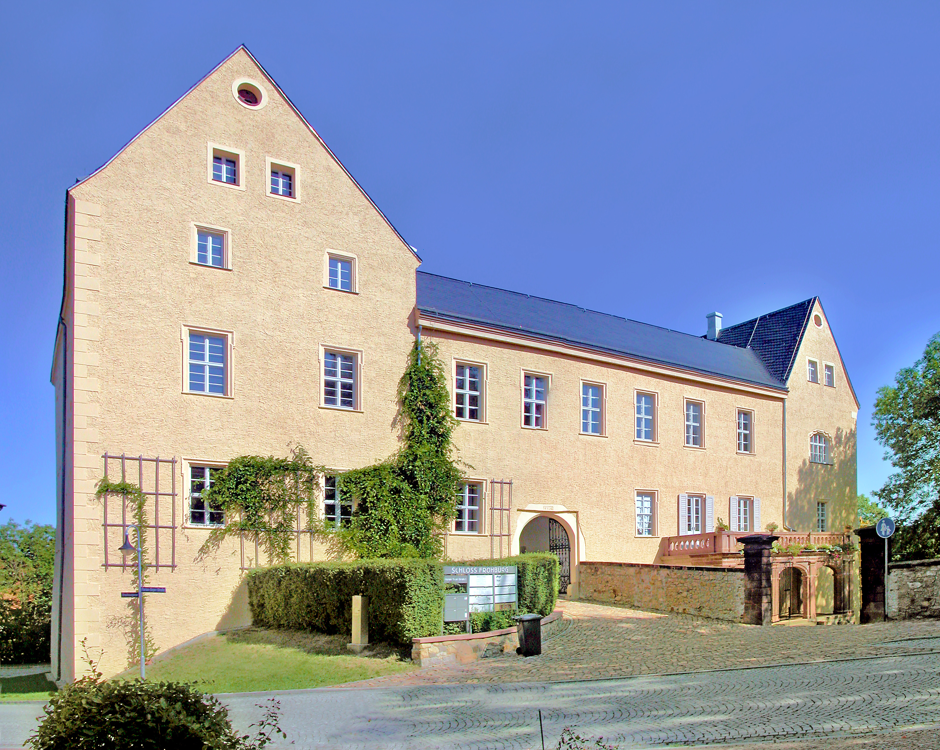 Frohburg: Schloß, Eingangsseite von SW. Die heutige Vierflügelanlage entstand durch stetige Um- und Ausbauten infolge mehrfachen Besitzerwechsels aus einer mittelalterlichen Burganlage (um 1200). [DSCN38687-38688.TIF]20090901080MDR.JPG(c)Blobelt